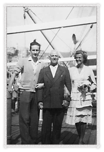 Detalmo Prizio-Biroli und Fey von Hassell